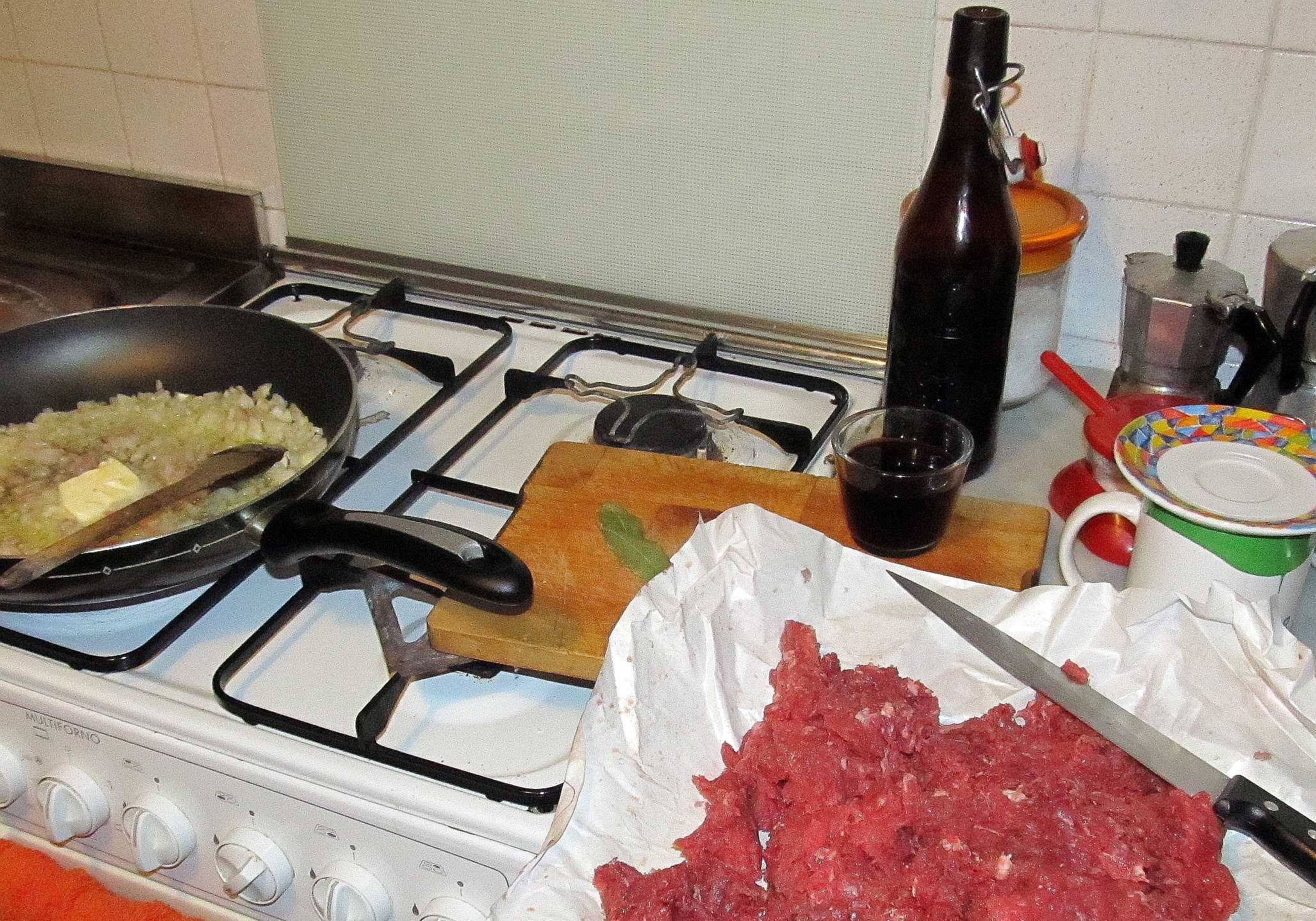 Preparazione del tapulòn: il soffritto